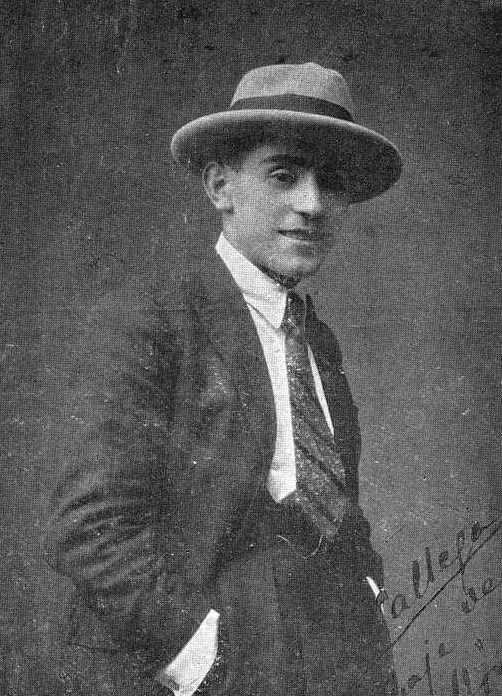 Xavier Bóveda, fotografía en Vida Gallega 1924